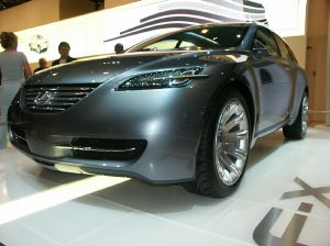 img_PICT2634A